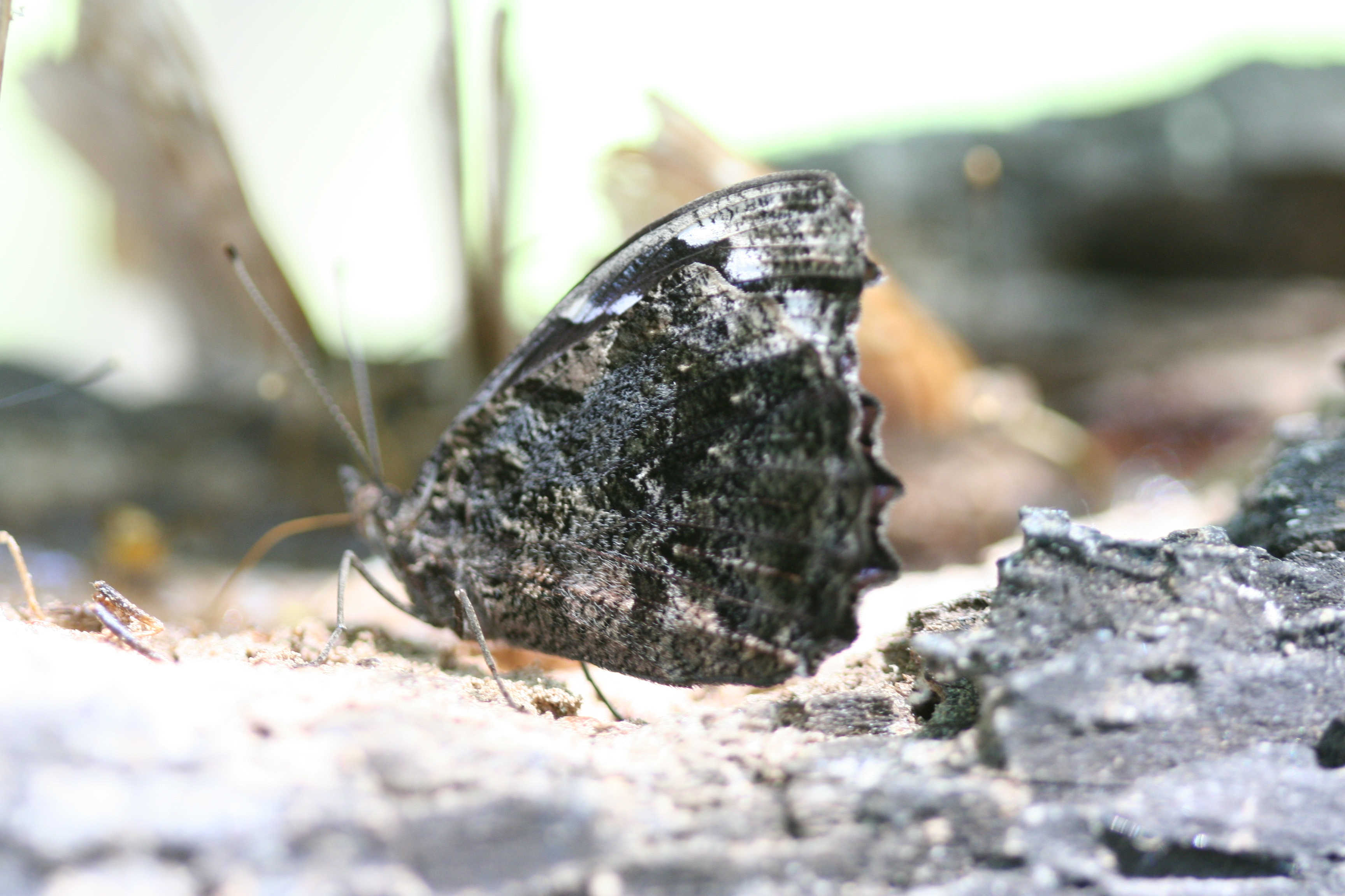 Ventral